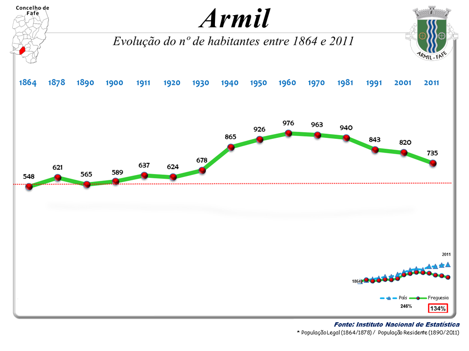 Censos 1864/2011